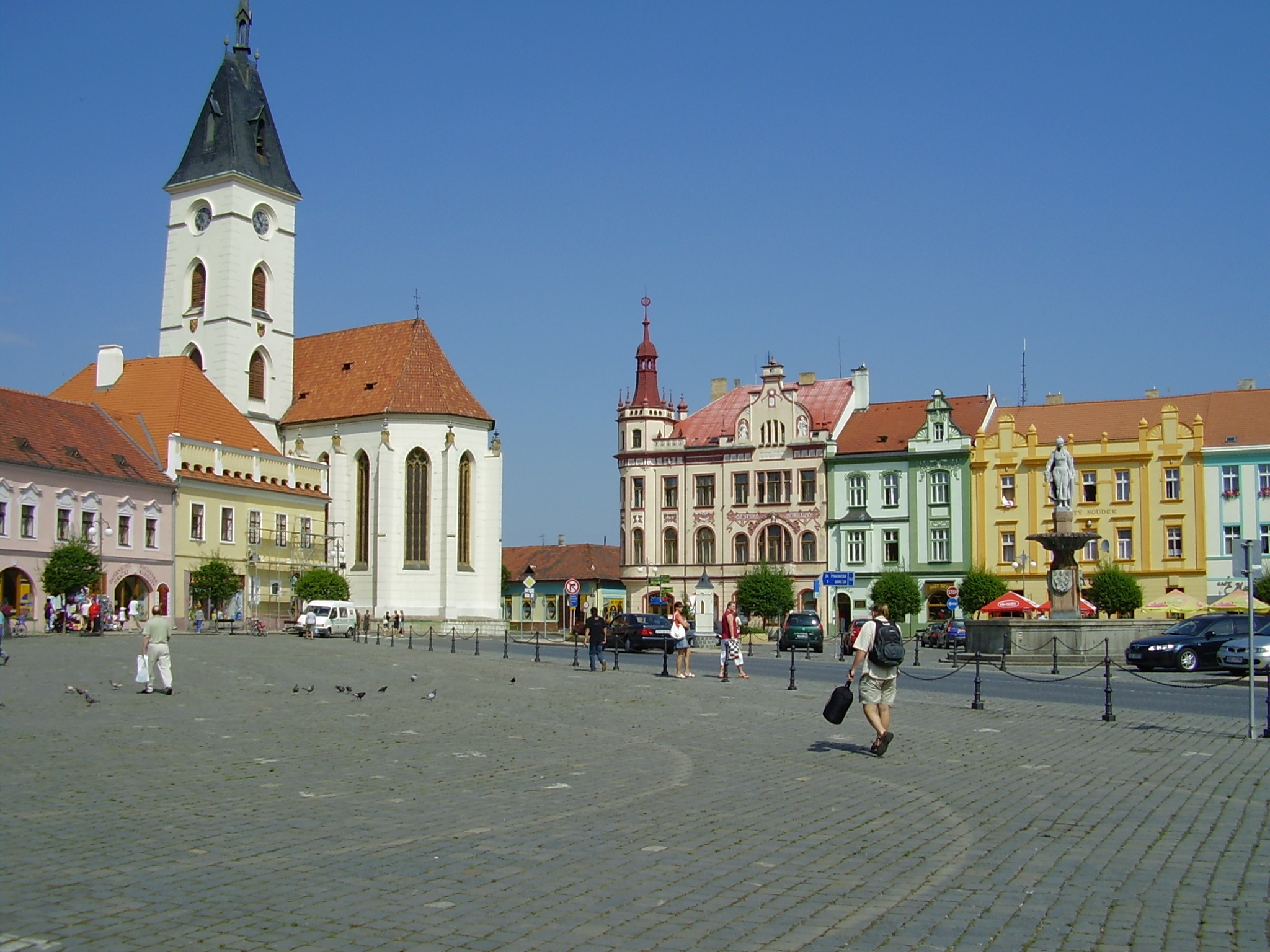 Vodňany Hauptplatz